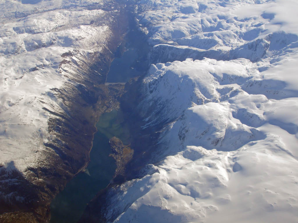 Inste delen av Sørfjorden i Hardanger og Sandvinsvatnet oppom. Odda mellom fjorden og vatnet.